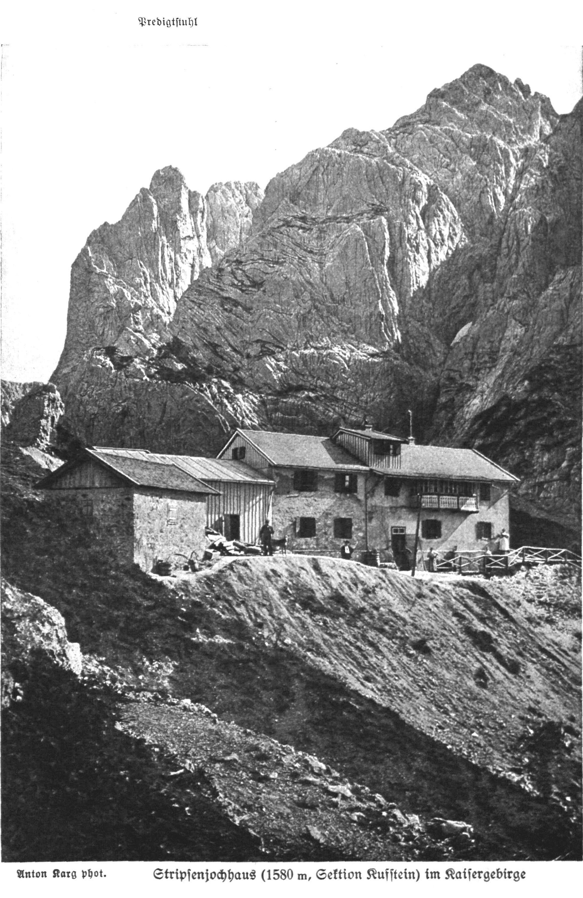 Stripsenjochhaus (1580m, Sektion Kufstein) im Kaisergebirge aus Zeitschrift des Deutschen und Oesterreichischen Alpenvereins 1919 Band 50